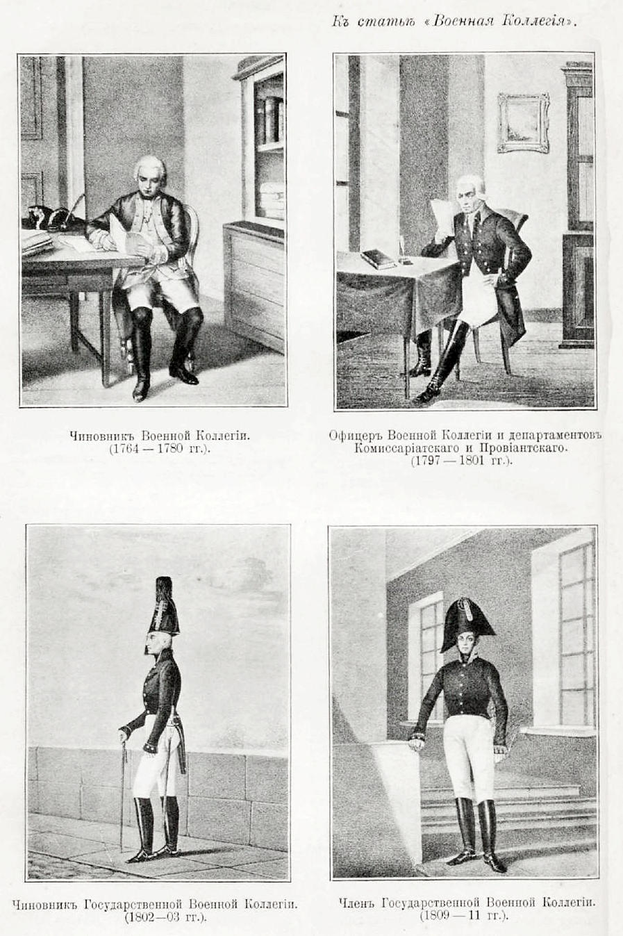 Данное изображение было использовано в статье «Военная коллегия» опубликованной в шестом томе «Военной энциклопедии», который был издан книгоиздательским товариществом Ивана Дмитриевича Сытина в 1912 году в столице Российской империи городе Санкт-Петербурге.